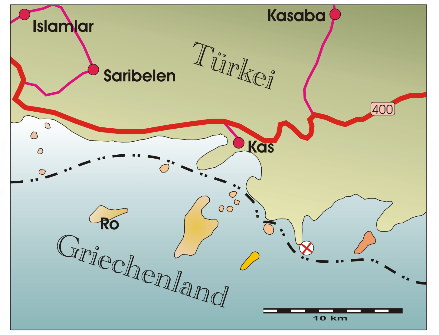 Fundort Schiff von Uluburun Quelle: Selbst gezeichnet Fotograf/Zeichner: presse03 Datum: 17.03.2006